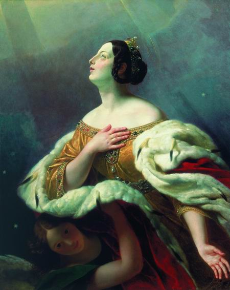 St. Alexandra (К.П. Брюллов. Святая царица Александра, вознесенная на небо)